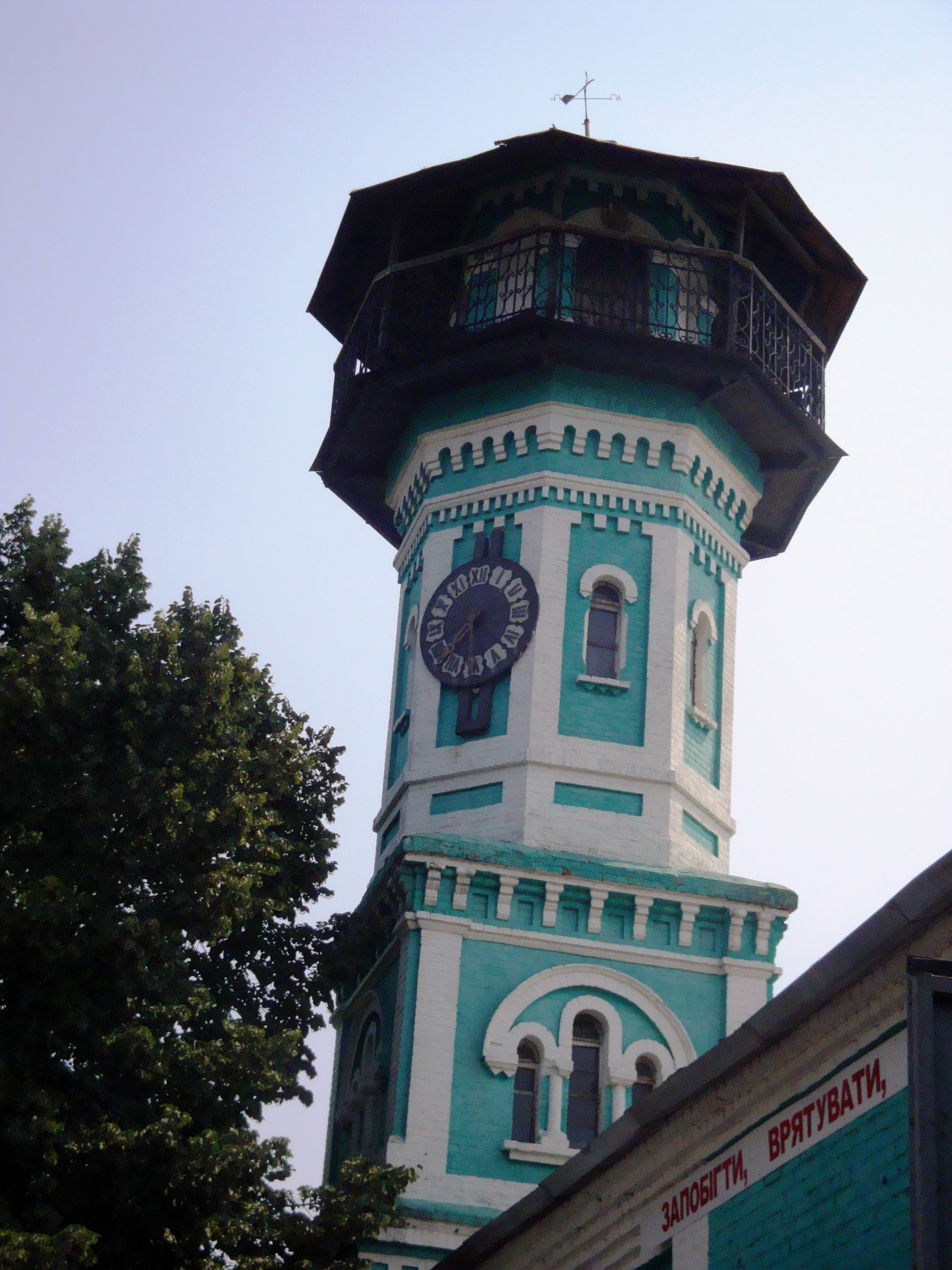 Будинок пожежного депо, Олександрія, вул. Калініна, 10